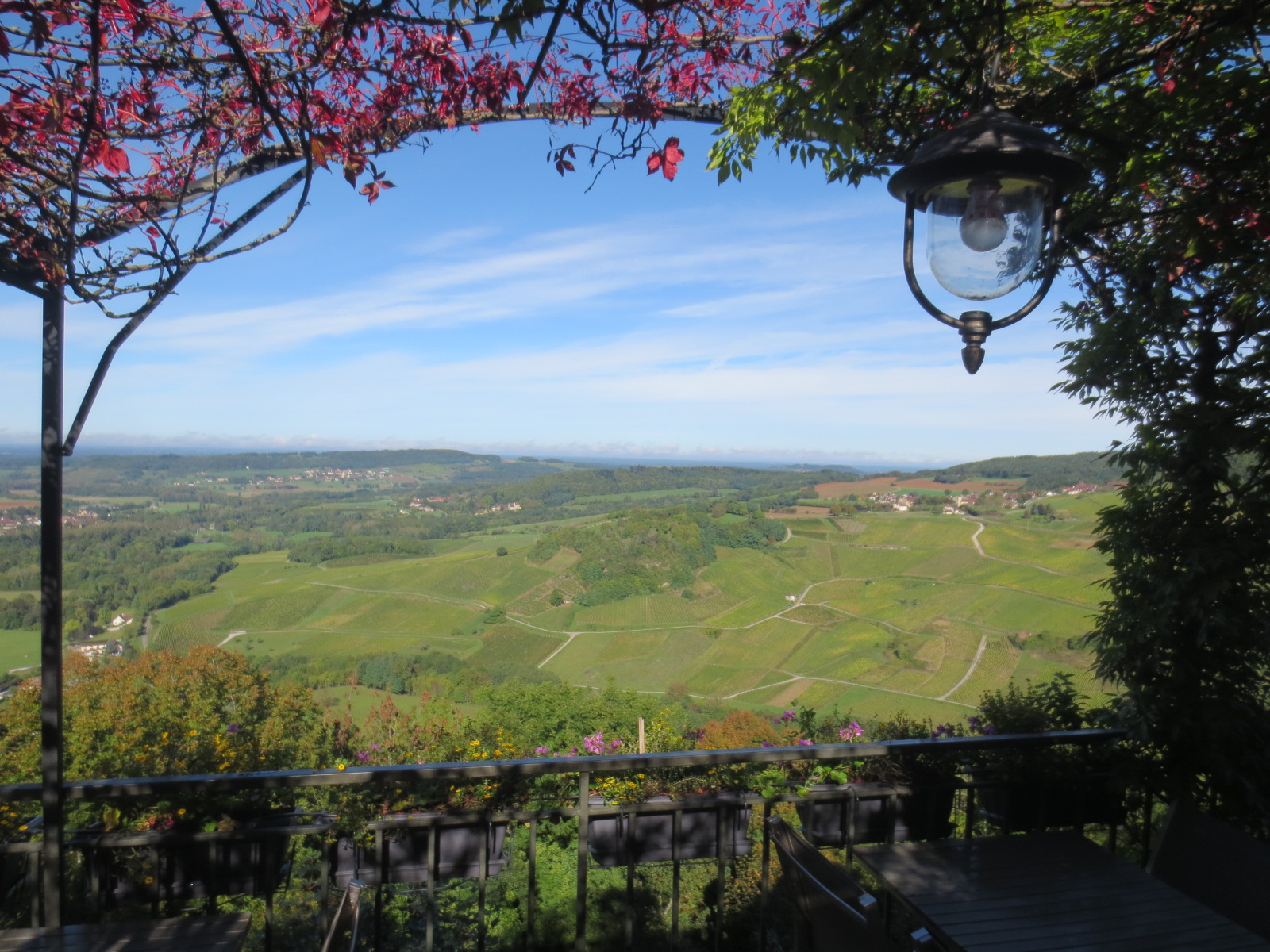 Vignoble du Jura, vu depuis une terrasse de Château Chalon